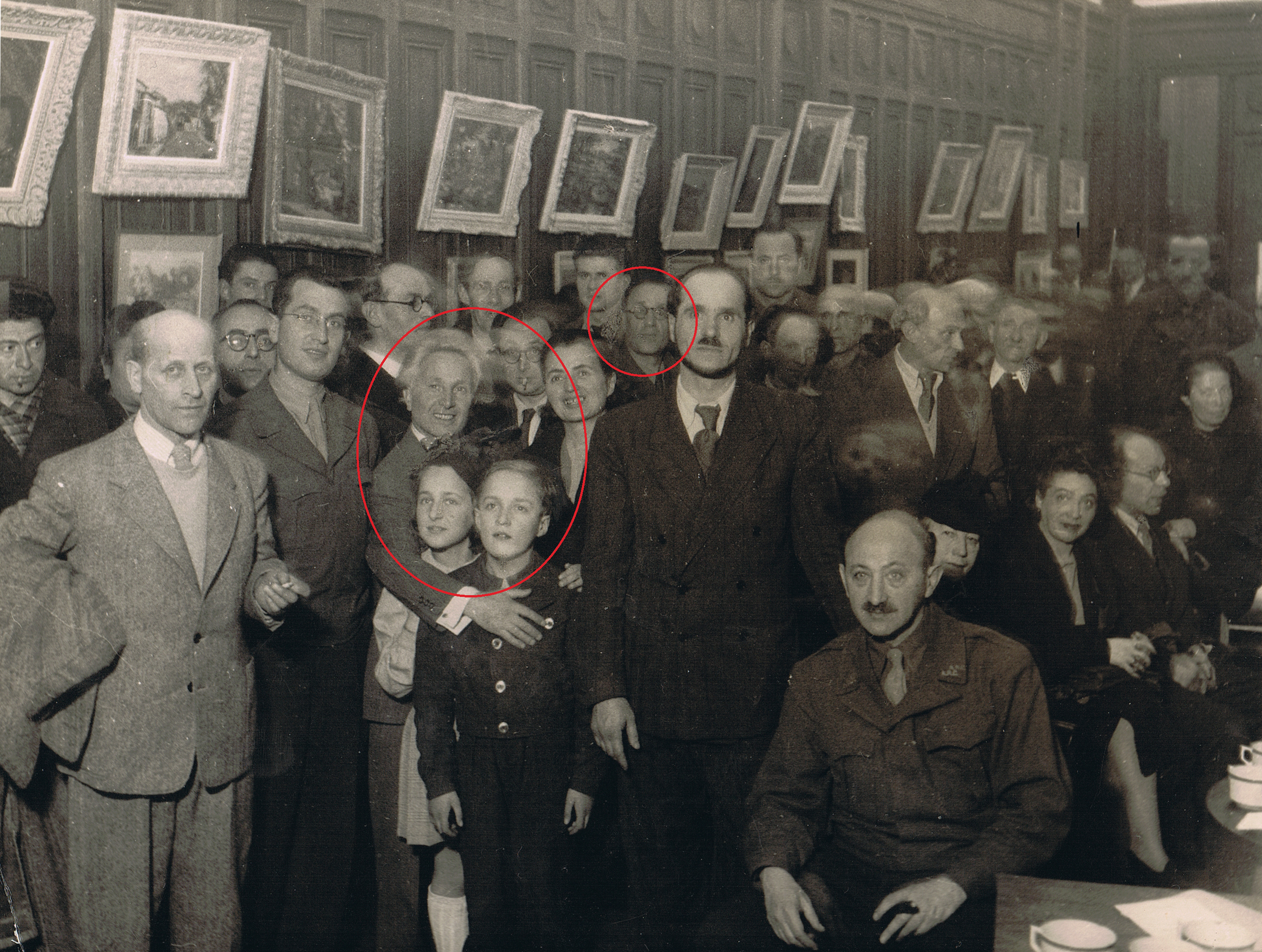 תערוכת אמנים יהודיים בפריז 1946 אלברט רובין בעיגול מימין ובעיגול משמאל מאנה כץ מחבק את ילדיו של אלברט רובין